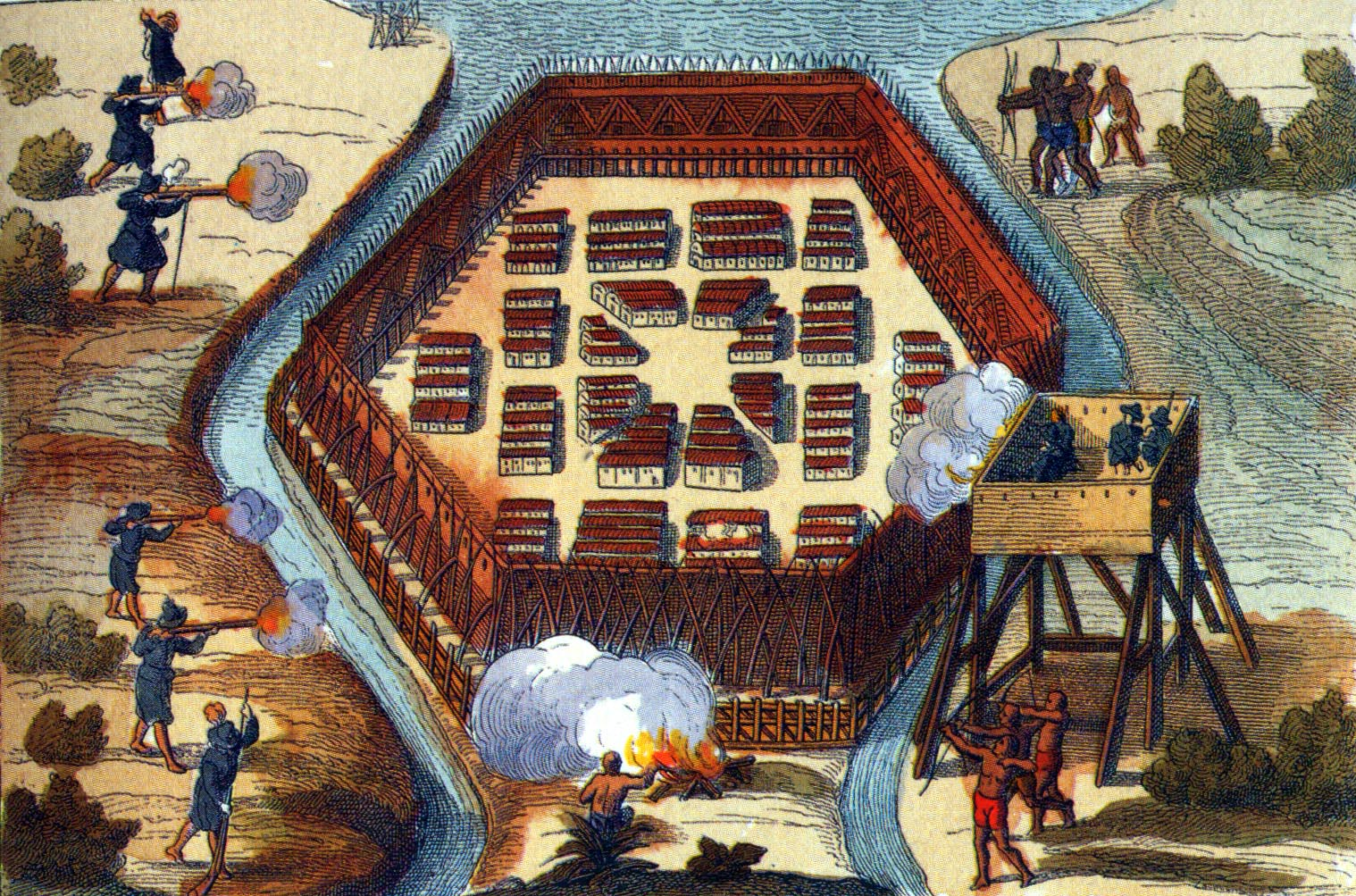 Гравюра Джорджа Кетлина. Війська Шамплейна штурмують табір онондагів